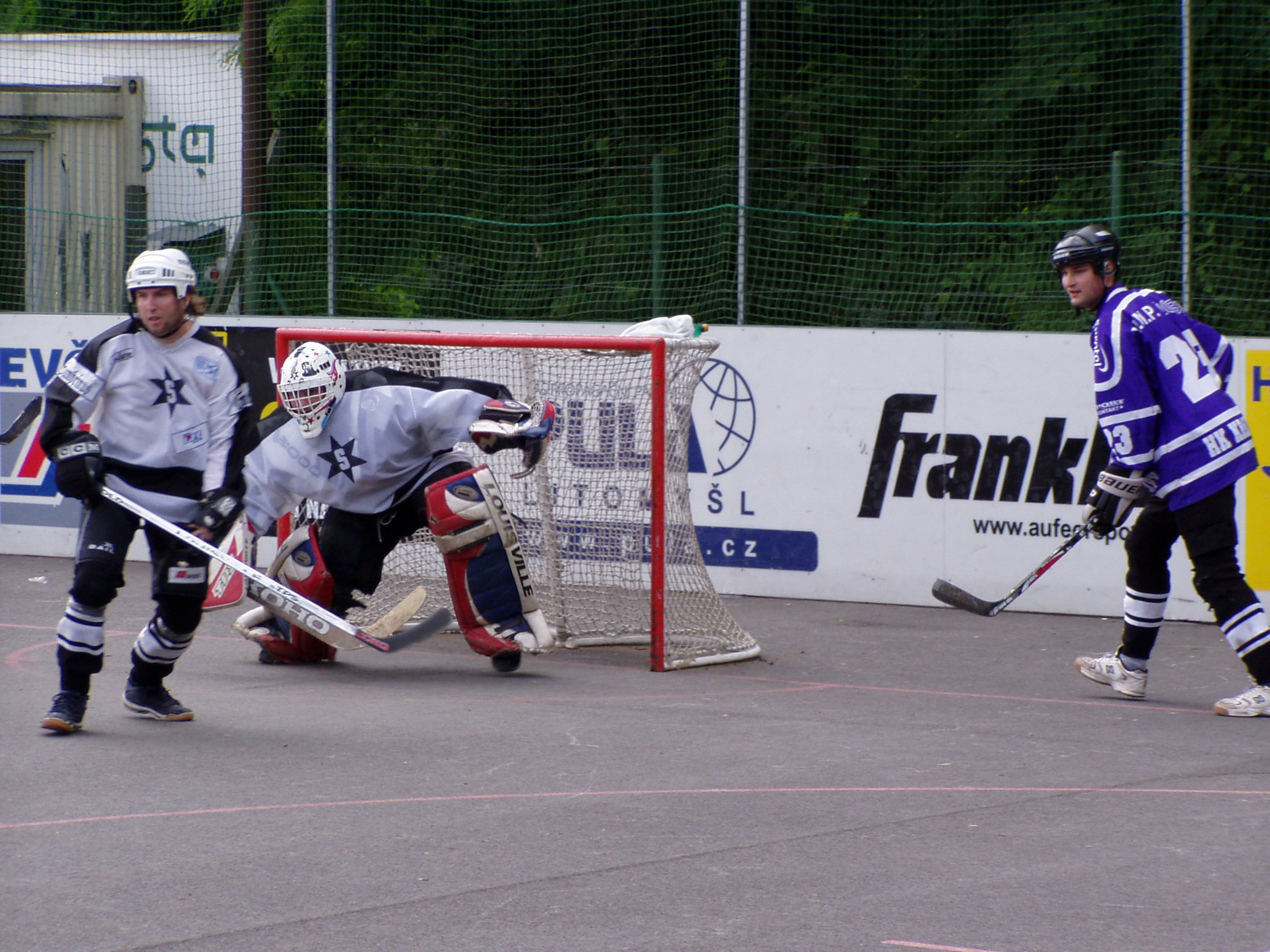 Hráč za bránou